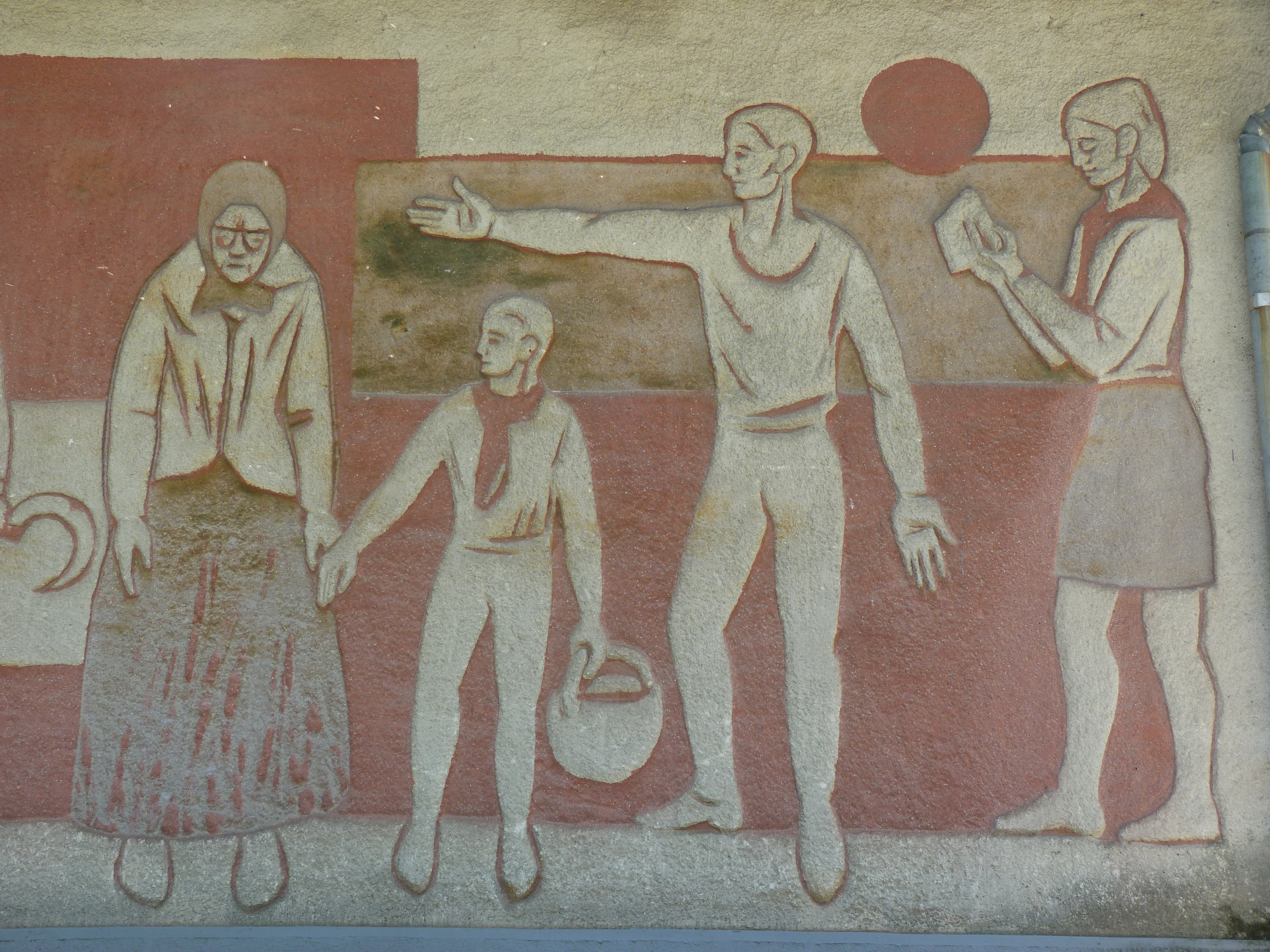 A felvétel 2014. június én készült Tokaj-Rakamazon. A Vizisport Turistaház eredetileg úttörő tábornak épült. A vasútállomástól 1.400 méter távolságban található, Tokaj belvárosától a Tisza választja el. A füvesített kb. 1 hektáros területen foci és röplabda pálya, hinták, és homokozó található. A turistaháznak saját kikötője és vízisport eszköz kölcsönzője van. A négyágyas szobák berendezése egyszerű. Pozíció: 48° 7' 14.6352" N, 21° 25' 6.0636" E Telefon: 47/552-187